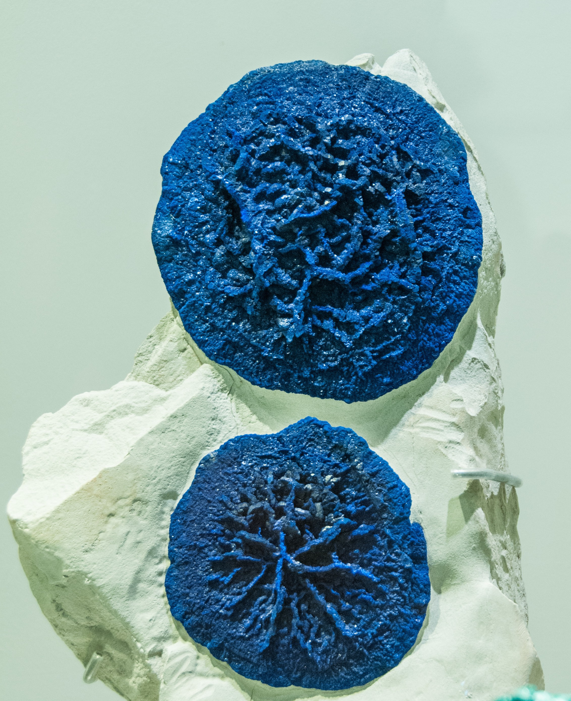 Azurite in siltstone, Malbunka mine, NT